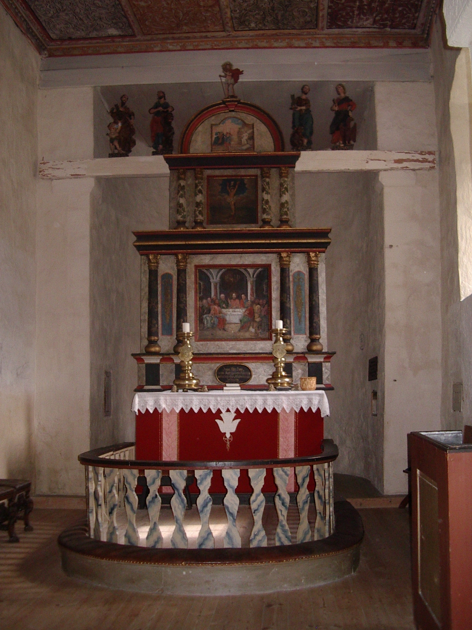 Kviteseid gamle kirke, alter